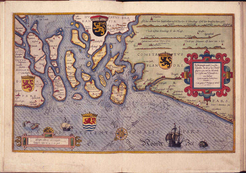 Lucas Janszoon Waghenaer, Spieghel der zeevaerdt, extract / extrait